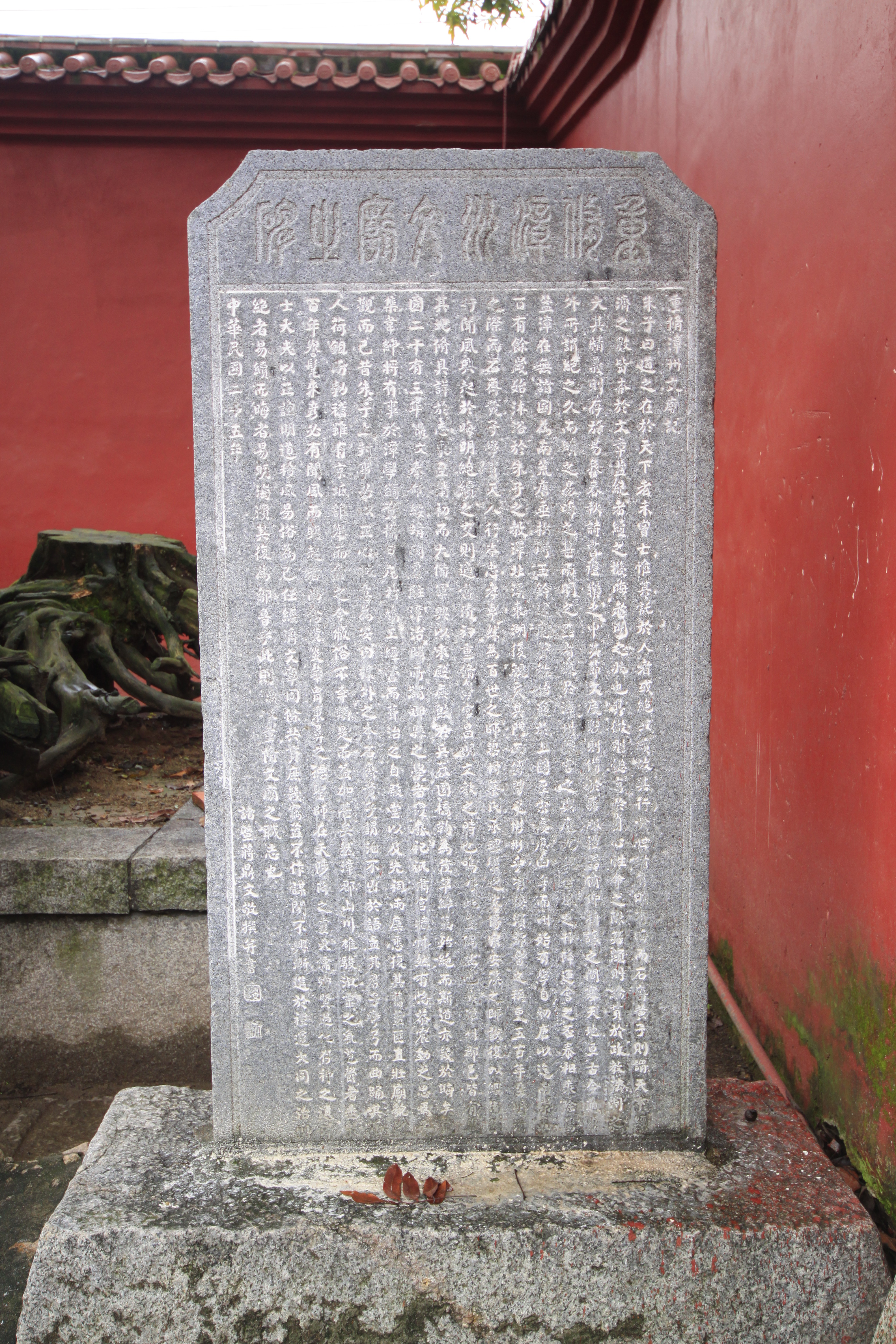 漳州府文庙，位于中国福建省漳州市，是全国重点文物保护单位。